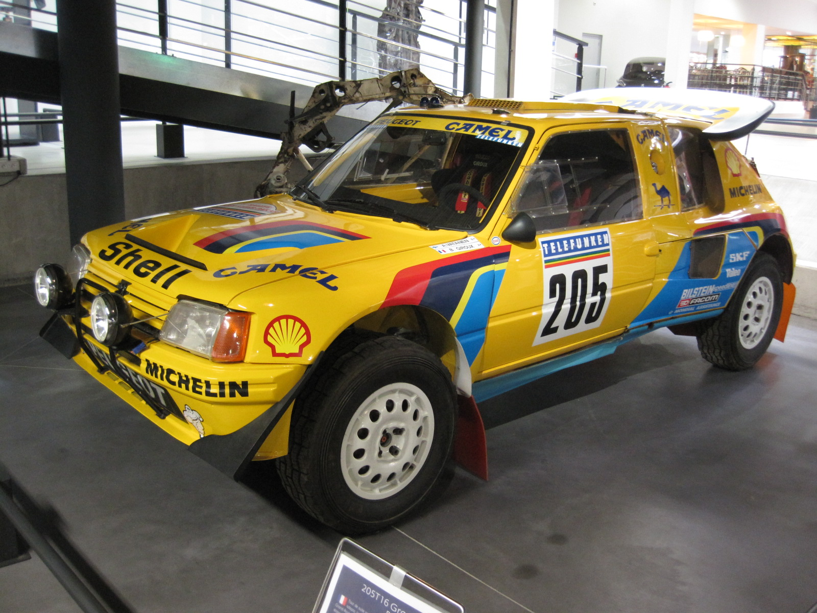 Peugeot 205 Turbo 16 Grand Raid Paris/Dakar - Piloté par Ari Vatanen - Musée de l'Aventure Peugeot de Sochaux.